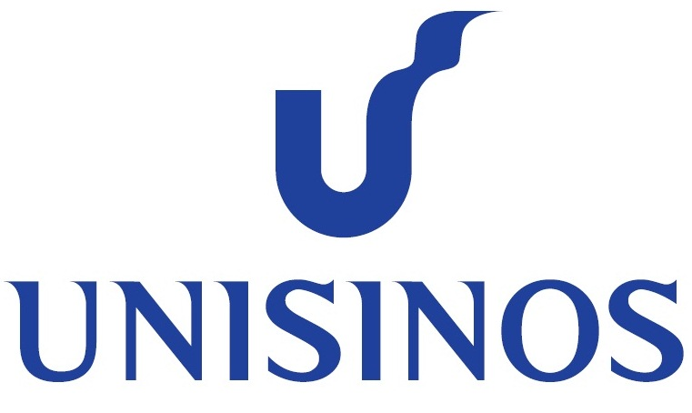 Logotipo Unisinos